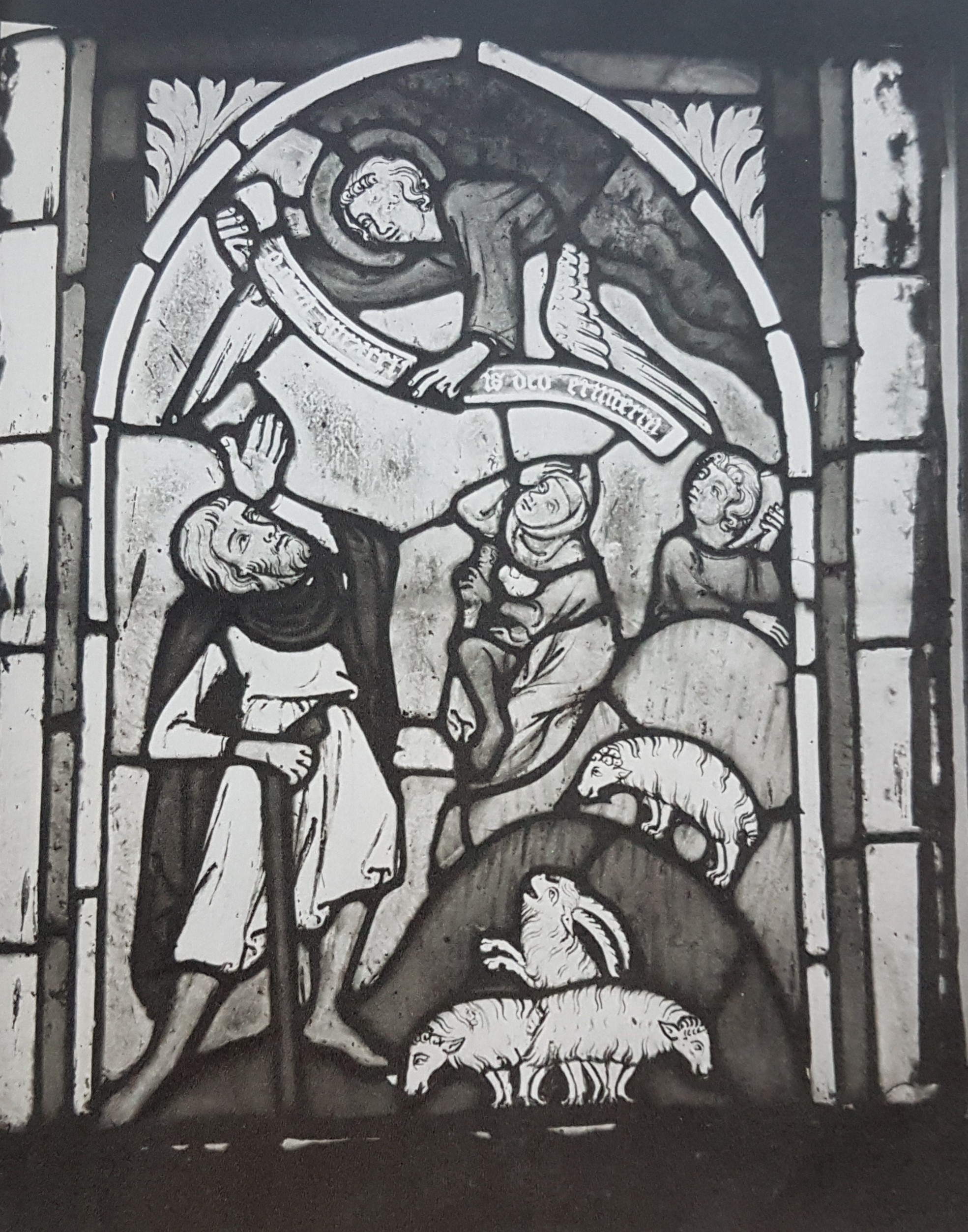 Jesu födelse avbildat i ett glasfönster i Lye kyr skapat av Lyemästaren, avfotograferad bild från Allhems Svenskt konstnärslexikon.